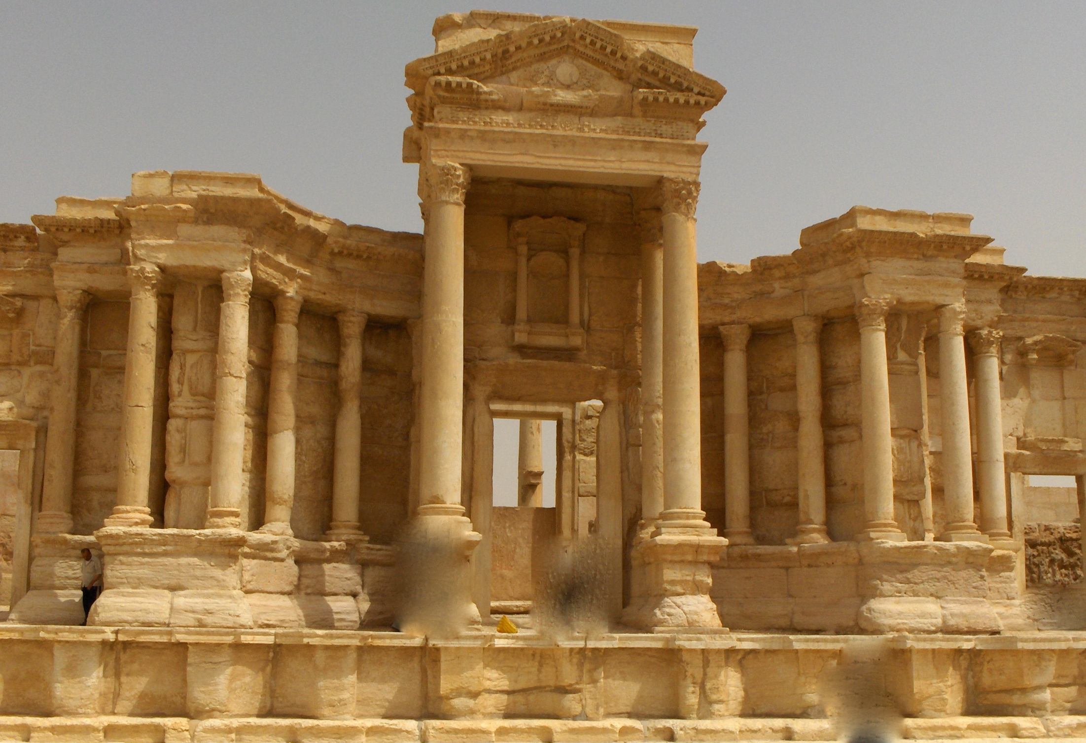 Scena del teatro di Palmira